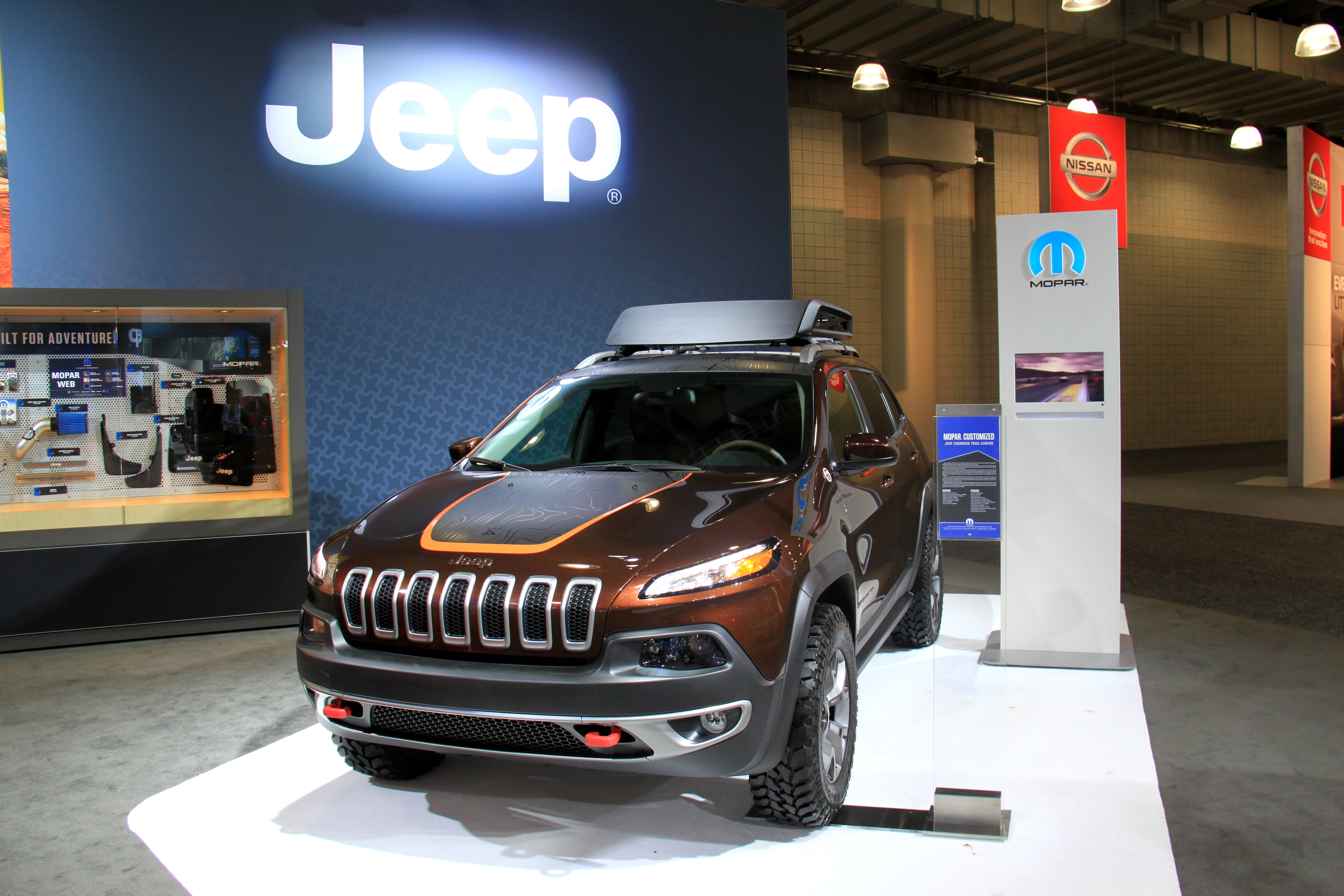 JEEP Cherokee Piattaforma: Alfa Romeo Giulietta esposizione: Salone Internazionale dell'automobile di New York 2014